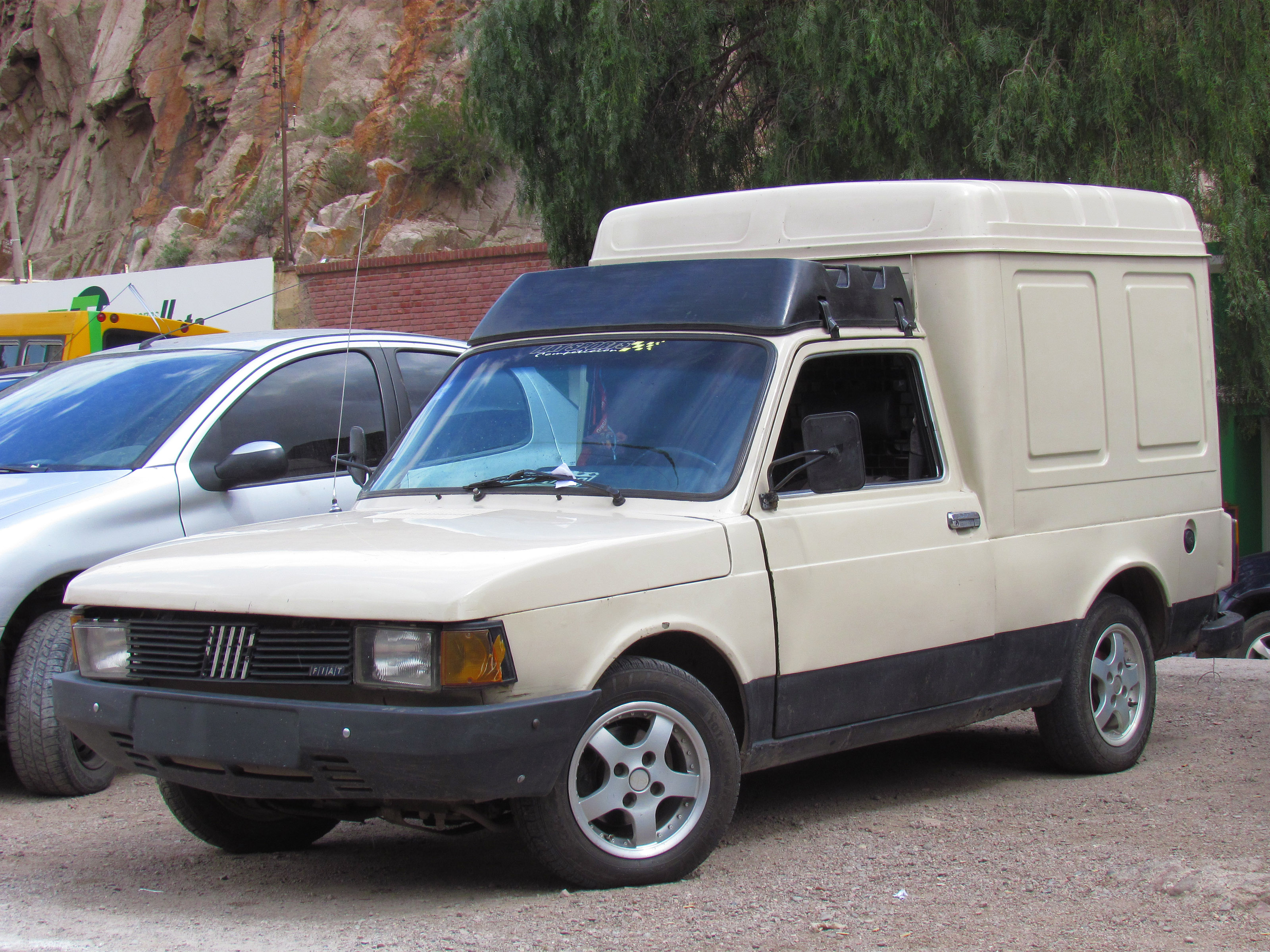 Fiat 147 Fiorino 1300